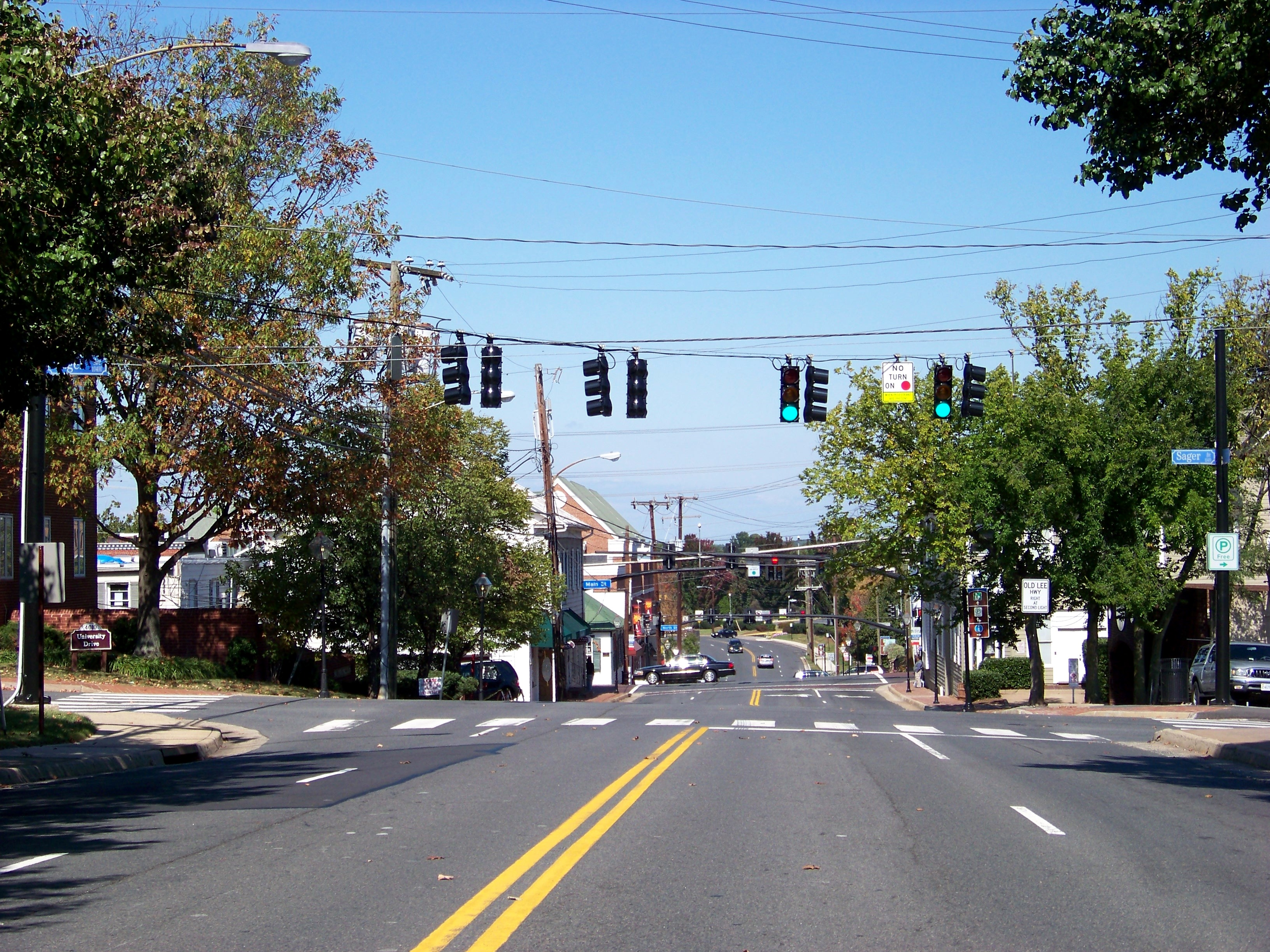 Fairfax, Virginia